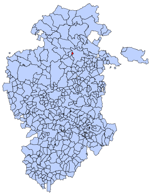 Situación de Cantabrana en el mapa de Burgos.